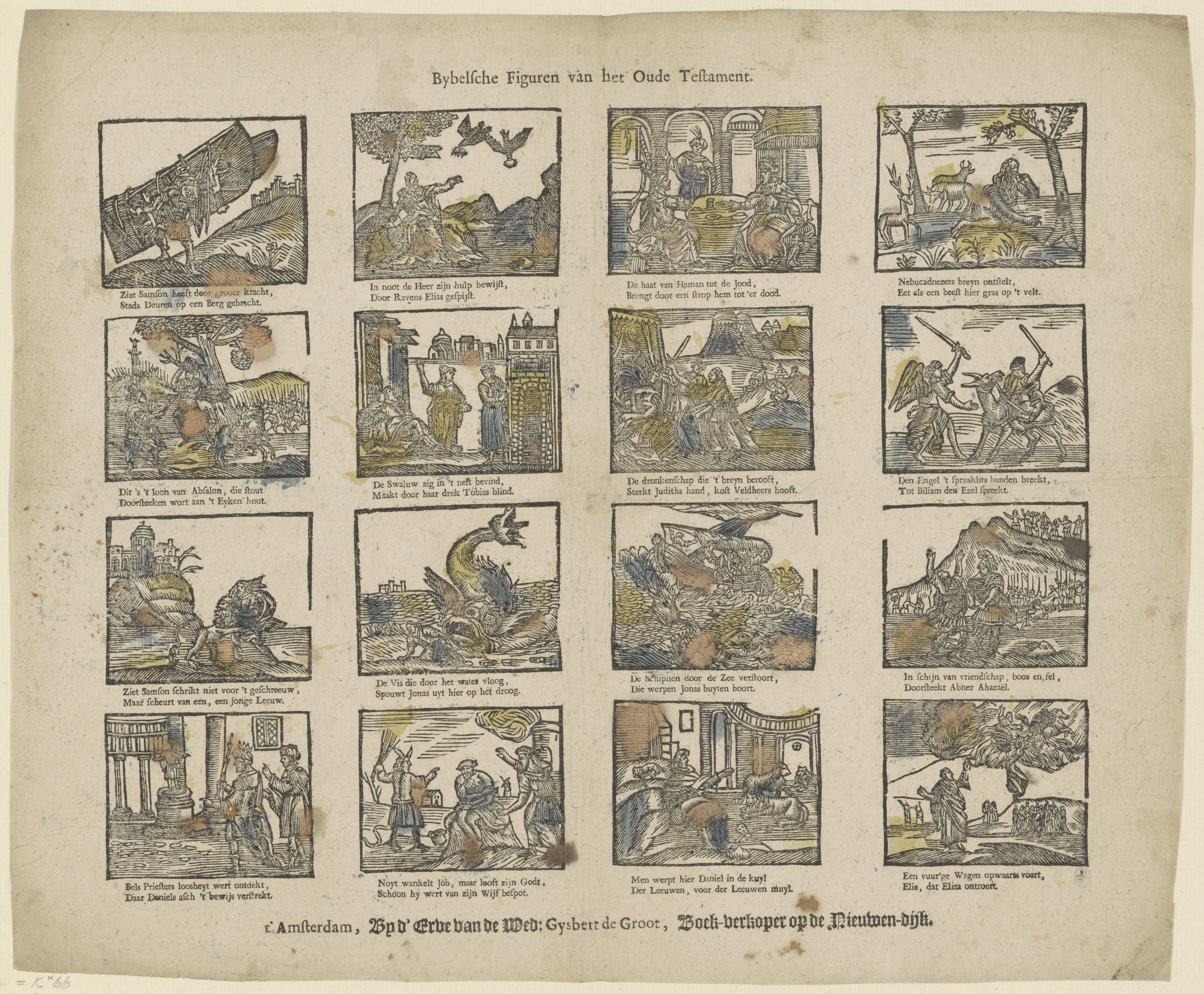 IdentificatieTitel(s): Bijbelsche figuren van het Oude Testament (titel op object)Objecttype: prent volksprent Objectnummer: RP-P-OB-200.190Opschriften / Merken: verzamelaarsmerk, verso, gestempeld: Lugt 2760Omschrijving: Blad met 16 voorstellingen van verhalen uit het Oude Testament, zoals Simson die de stadspoort van Gaza een bergtop op sleept, Tobit die blind wordt door de poep van een zwaluw en Jona die uit de vis wordt gespuugd. Onder elke afbeelding een tweeregelig vers.VervaardigingVervaardiger: uitgever: Erven Weduwe Gijsbert de Groot (vermeld op object)prentmaker: anoniemPlaats vervaardiging: AmsterdamDatering: 1725 - 1738Fysieke kenmerken: houtsnede gekleurd in geel, blauw en rood; tekst in boekdrukMateriaal: papier Techniek: houtsnede / kleuren / boekdrukAfmetingen: blad: h 309 mm × b 370 mmOnderwerpWat: Oude Testamentafter a three-day sojourn in the belly of the monster Jonah is cast on dry land; Jonah may be shown nude and bald-headedSamson carries the doors on his shoulders to the top of a hill near Hebrona bird dropping falls in Tobit's eyesVerwerving en rechtenCredit line: Schenking van de heer F.G. Waller, AmsterdamVerwerving: schenking 1923Copyright: Publiek domein